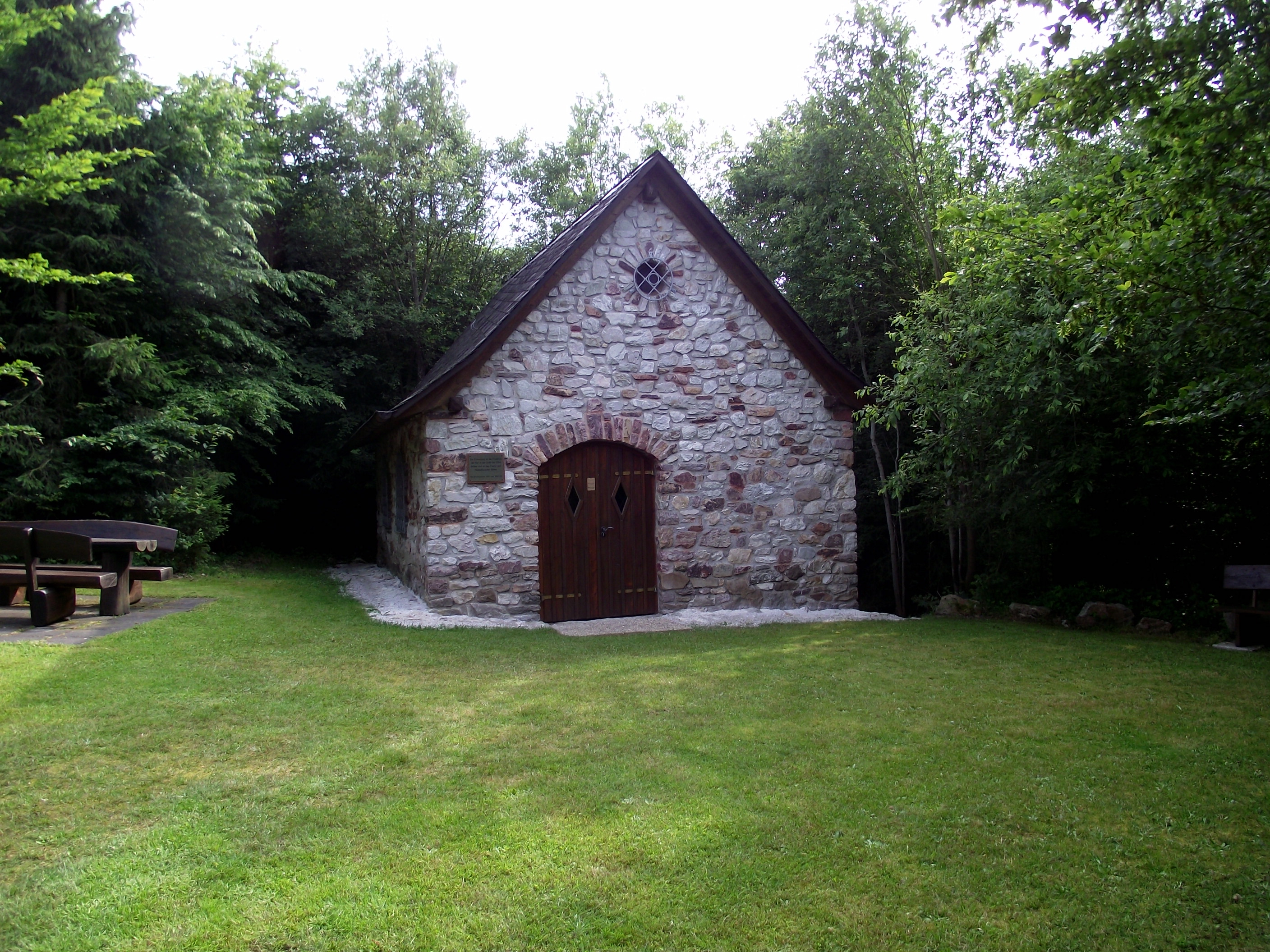 1997 wiedererbaute Eremitage Maria Reizenborn